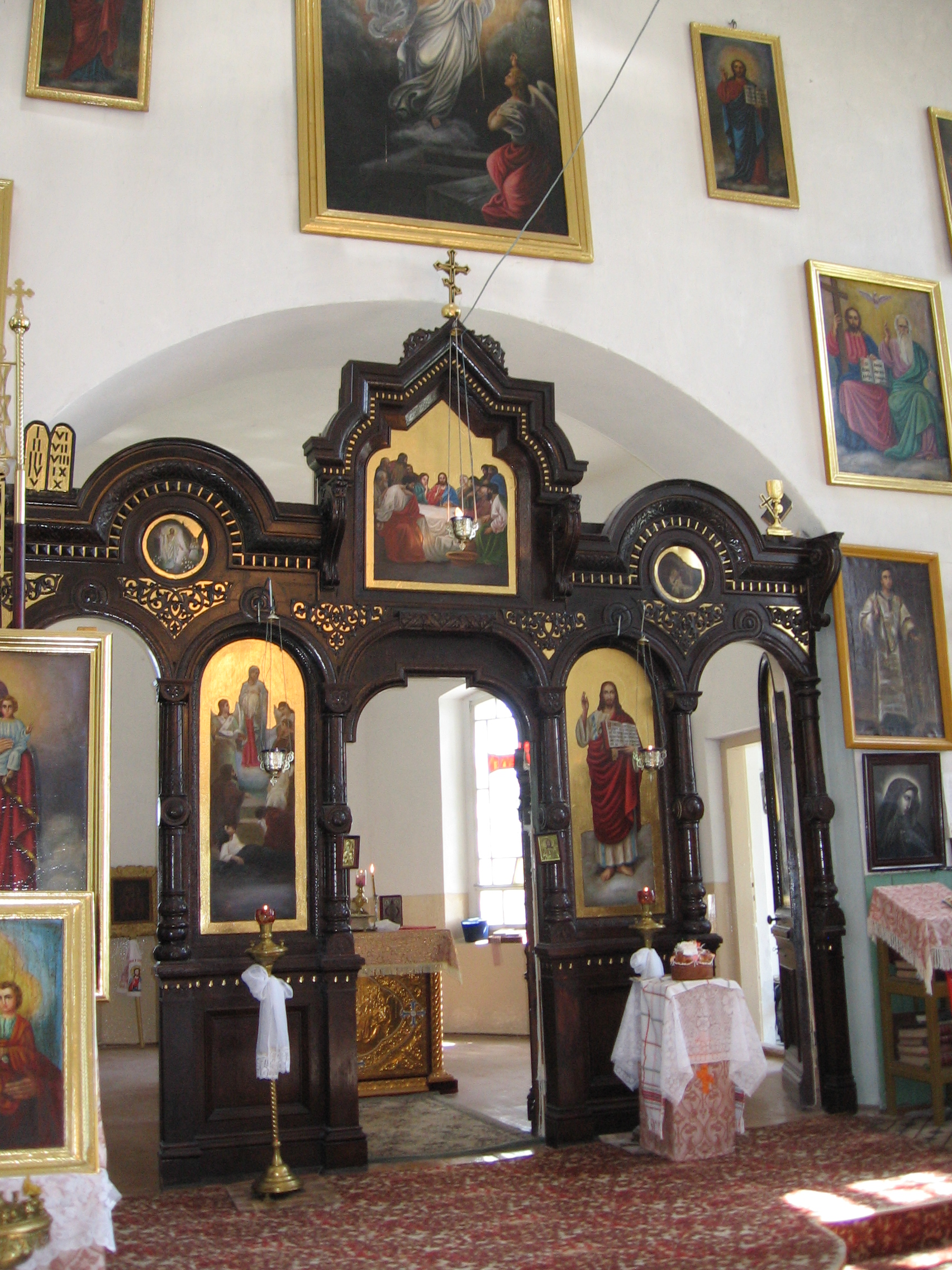 Беларуская (тарашкевіца): Царква ўзьвіжаньня Сьвятога Крыжа (Аранчыцы). Царскія вароты. This is a photo of Belarusian heritage monument. Reference number: 113Г000593 ( WLM)